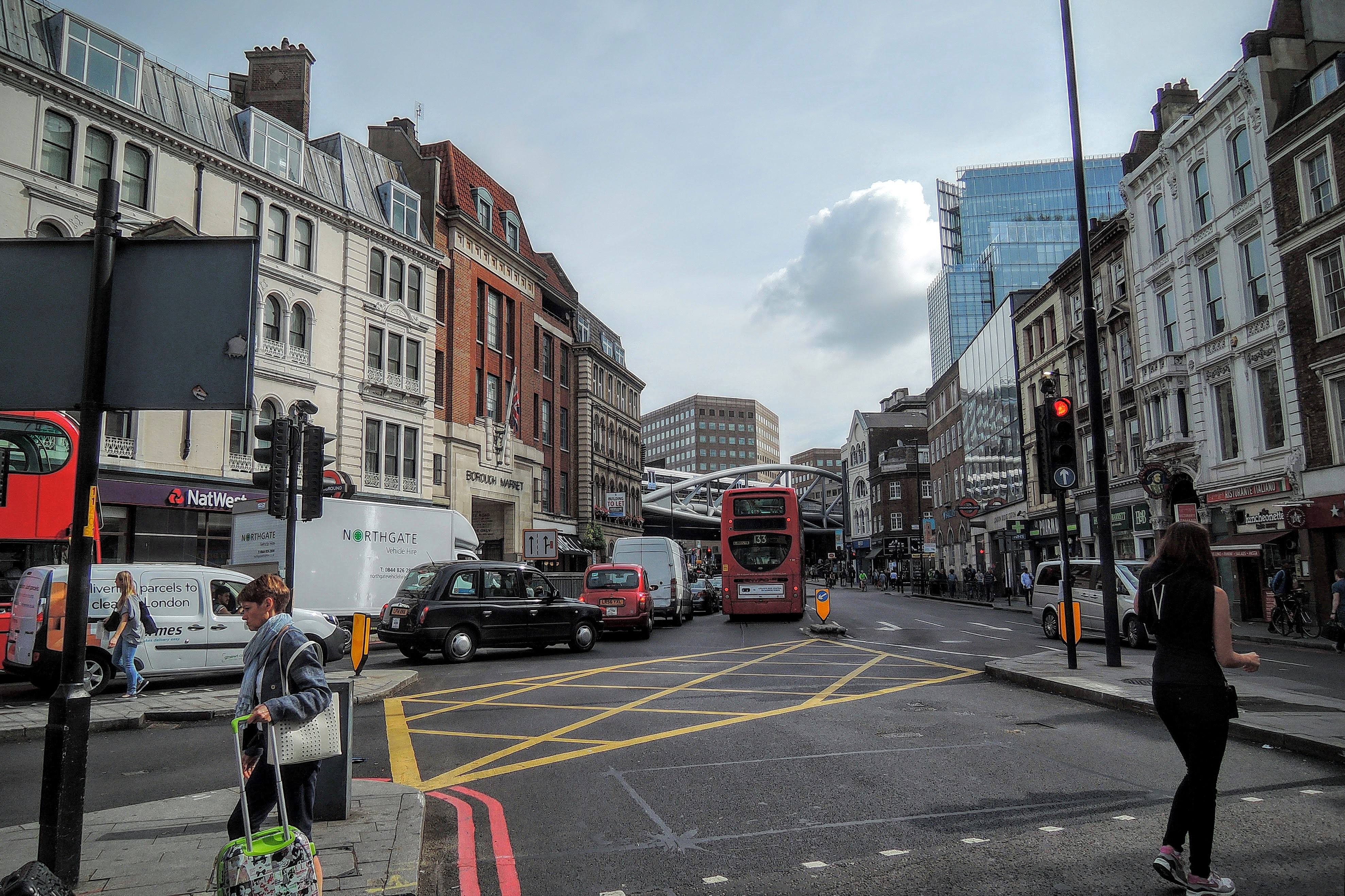 London, UK